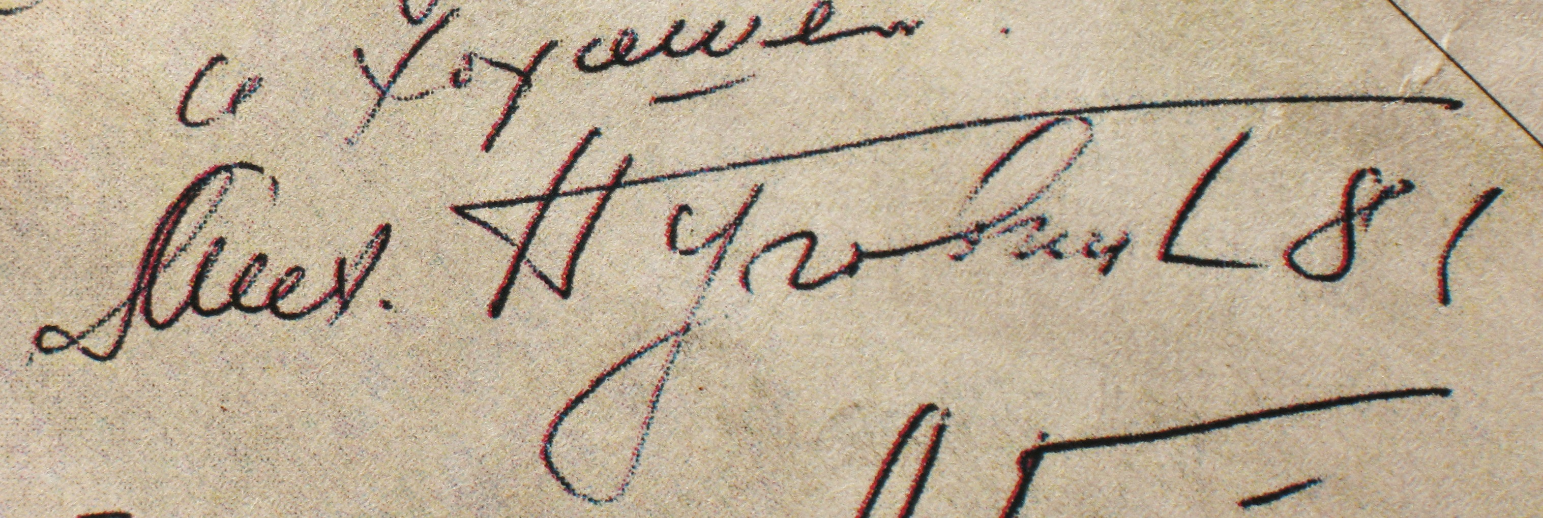 Михаил Пуговкин. Автограф на сценарии фильма "Спортлото-82". Крым, лето 1981. Soviet Mikhail Pugovkin signature (1981).